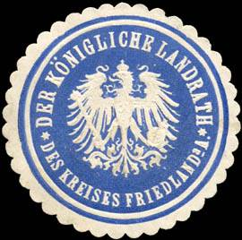 Sealing stamp Title: Der Königliche Landrath des Kreises Friedland Description: blau, weiß, geprägt Place: size: 4 cm